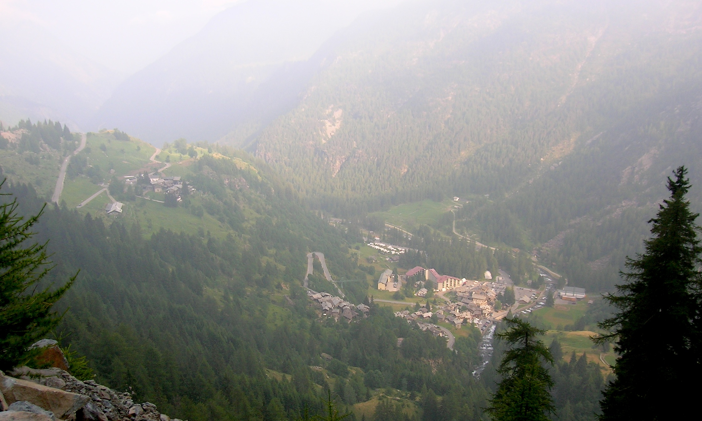 Chardonney nei vapori di una giornata piovosa. Champorcher, Valle d'Aosta, Italia.